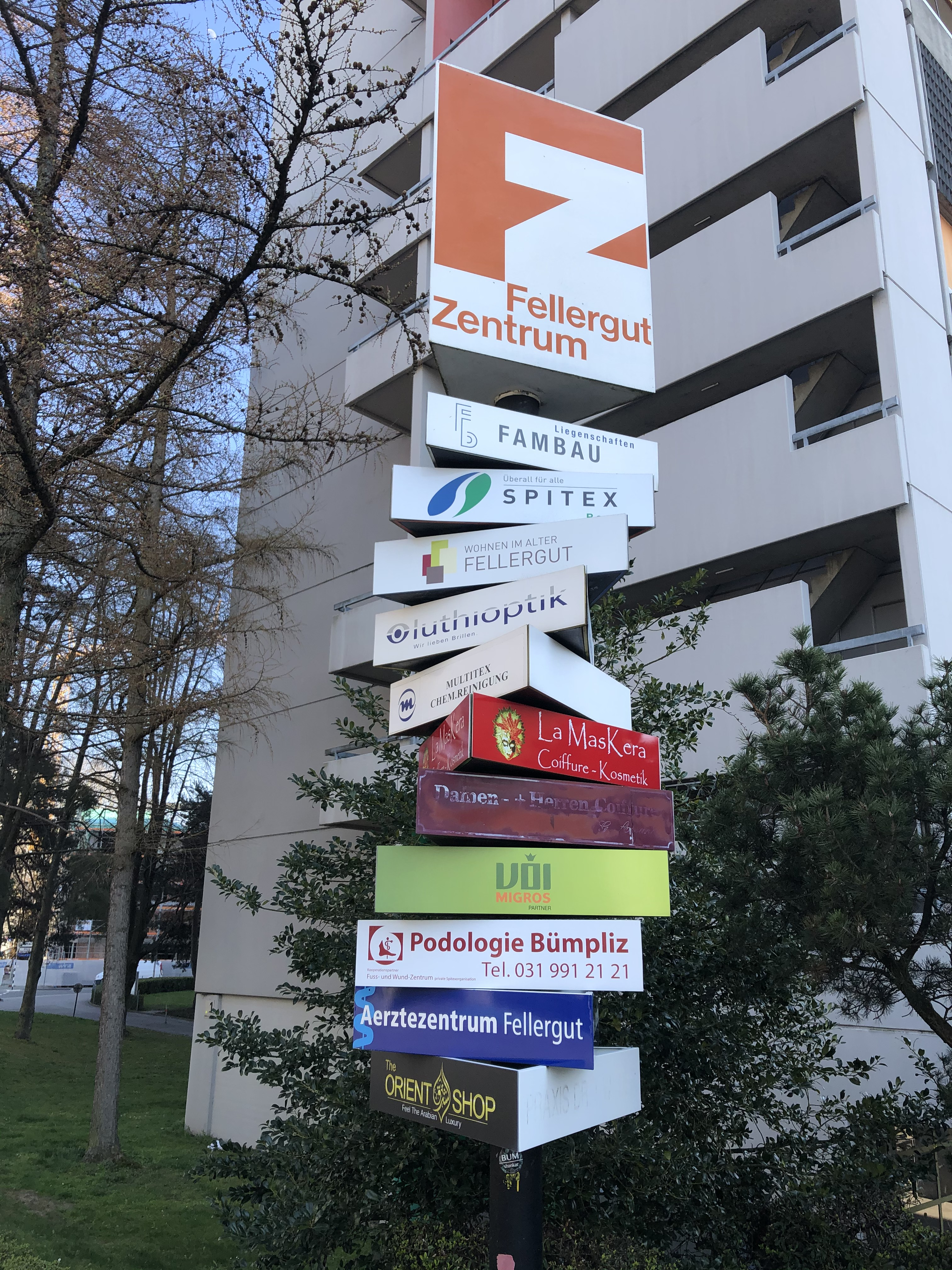 Fellergut Zentrum Beschilderung